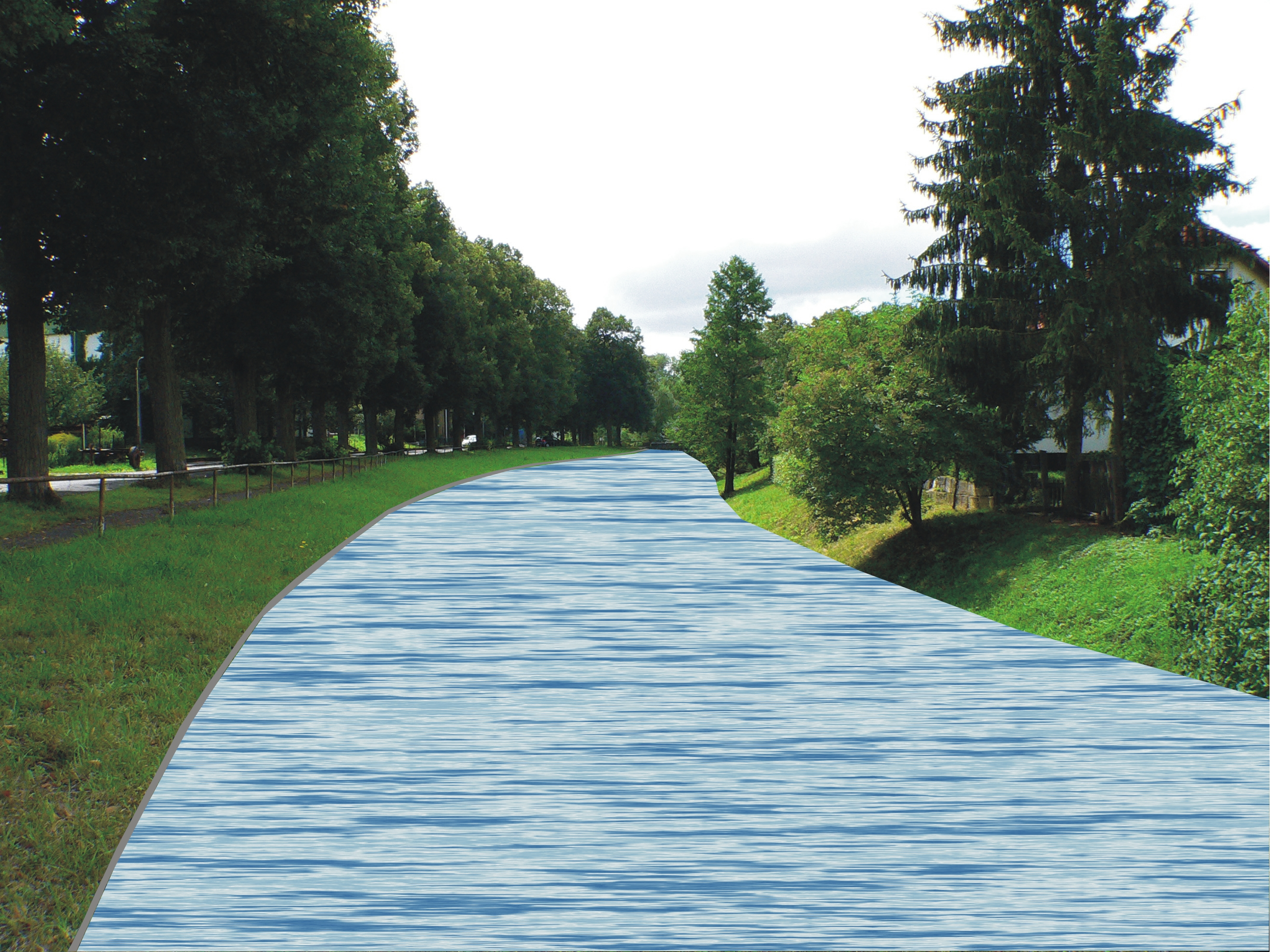 Main-Werra-Kanal (Deutschland): 1924-1961 geplanter möglicher Verlauf des Kanals im östlichen Bereich der Stadt Römhild entlang der Springe. Bau des Kanals wurde nie begonnen und 1961 verworfen. Landschaftsfoto real, Kanalverlauf montiert.